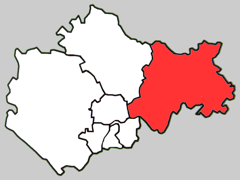 蚌埠市五河县地图